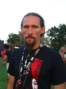 Gaahl, ex-vocalista de Gorgoroth y God Seed en el Wacken Open Air 2008